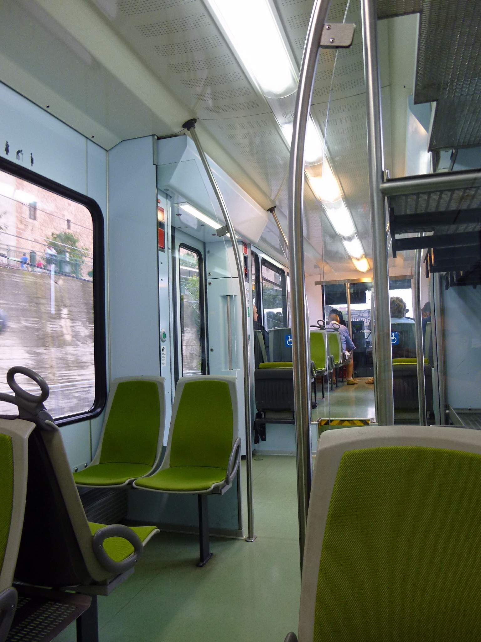 Tren cremallera de Montserrat